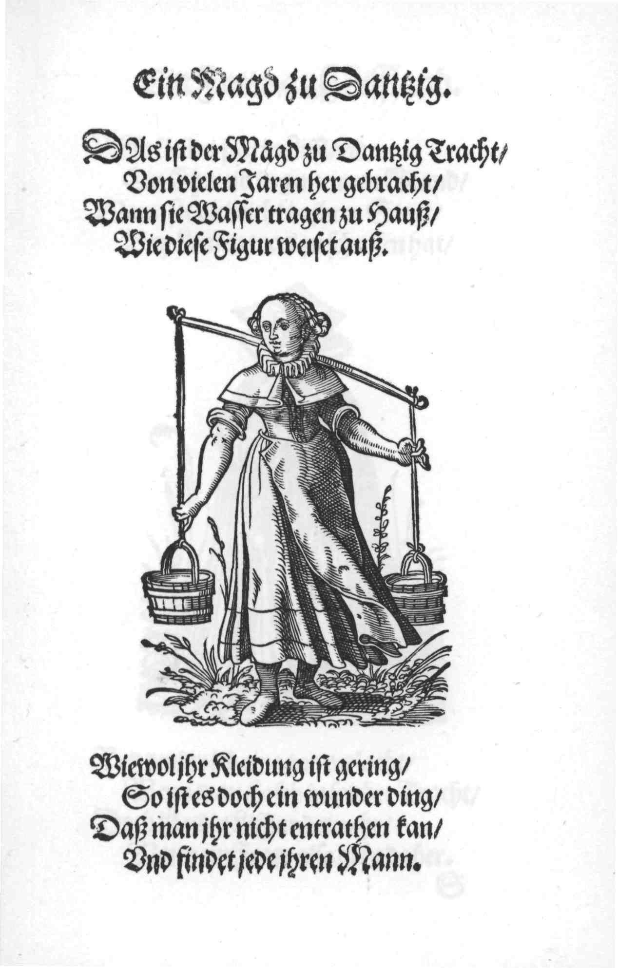 Ein Magd zu Dantzig. Page from: Im Frauwenzimmer Wirt vermeldt von allerley schönen Kleidungen vnnd Trachten der Weiber (= Frauen-Trachtenbuch), Getruckt zu Franckfurt am Mayn in Verlegung Sigmund Feyrabends, 1586